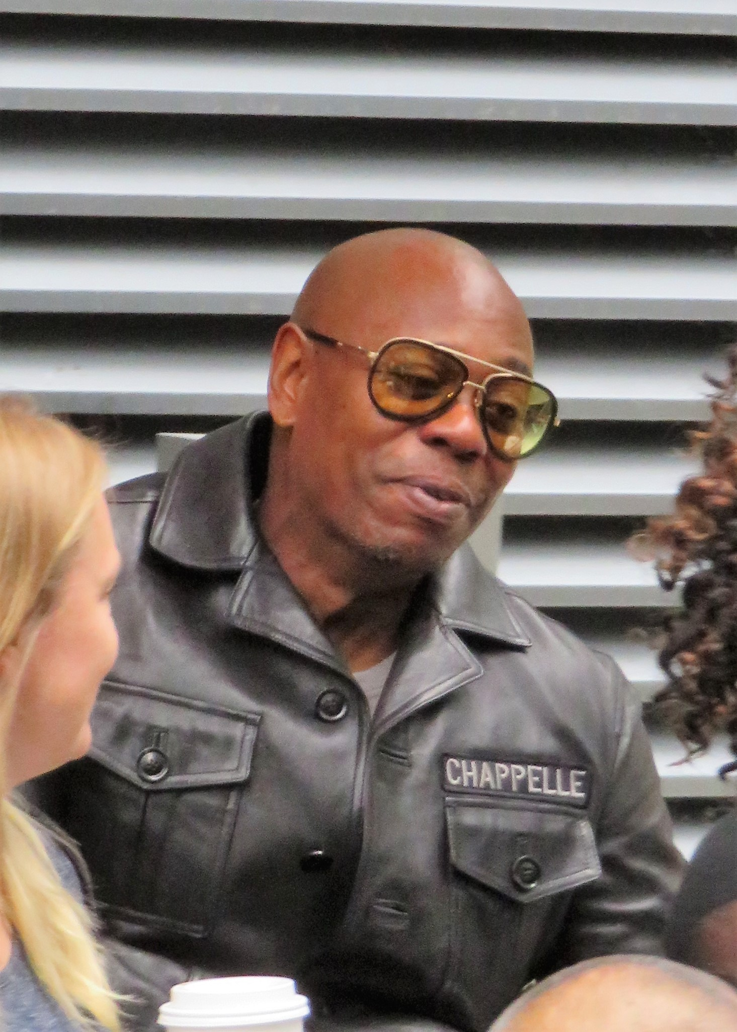 Dave Chappelle 01